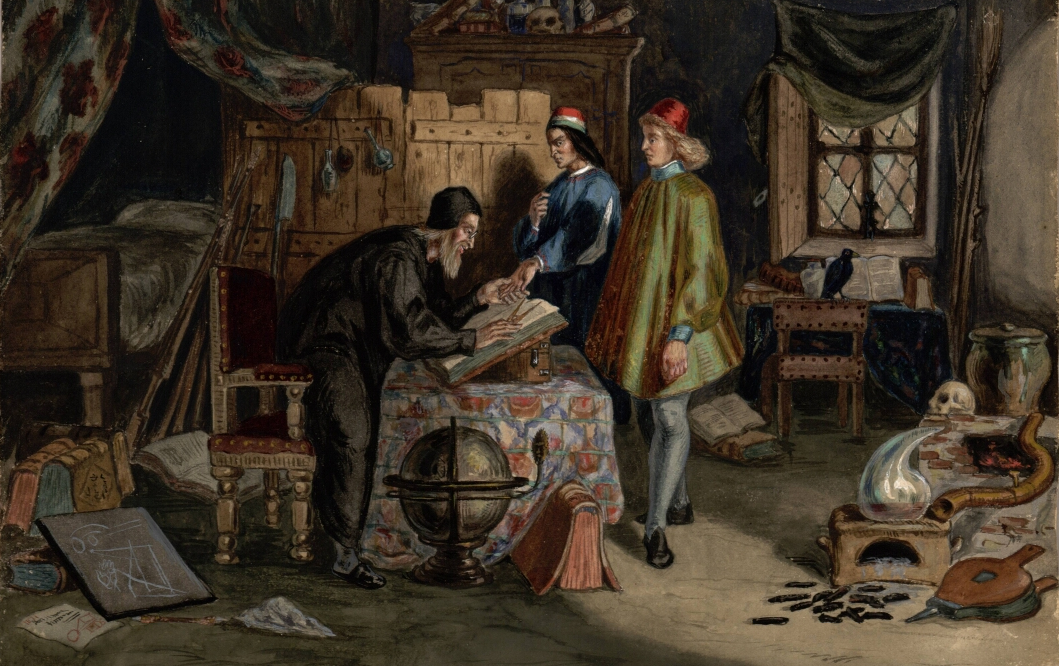 Gouache de Maurice Sand (1823-1889) pour le chapitre XXV du Tiers-Livre.